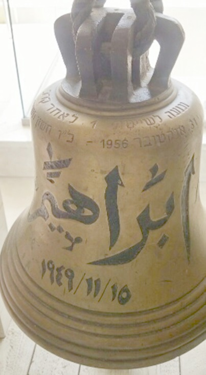 פעמון האוניה. כיתוב בערבית איבראהים 15 בנובמבר 1949. כיתוב בעברית נכנעה לשייטת 1 לאחר קרב 31 באוקטובר 1956,כ"ו חשון תשט"ז.